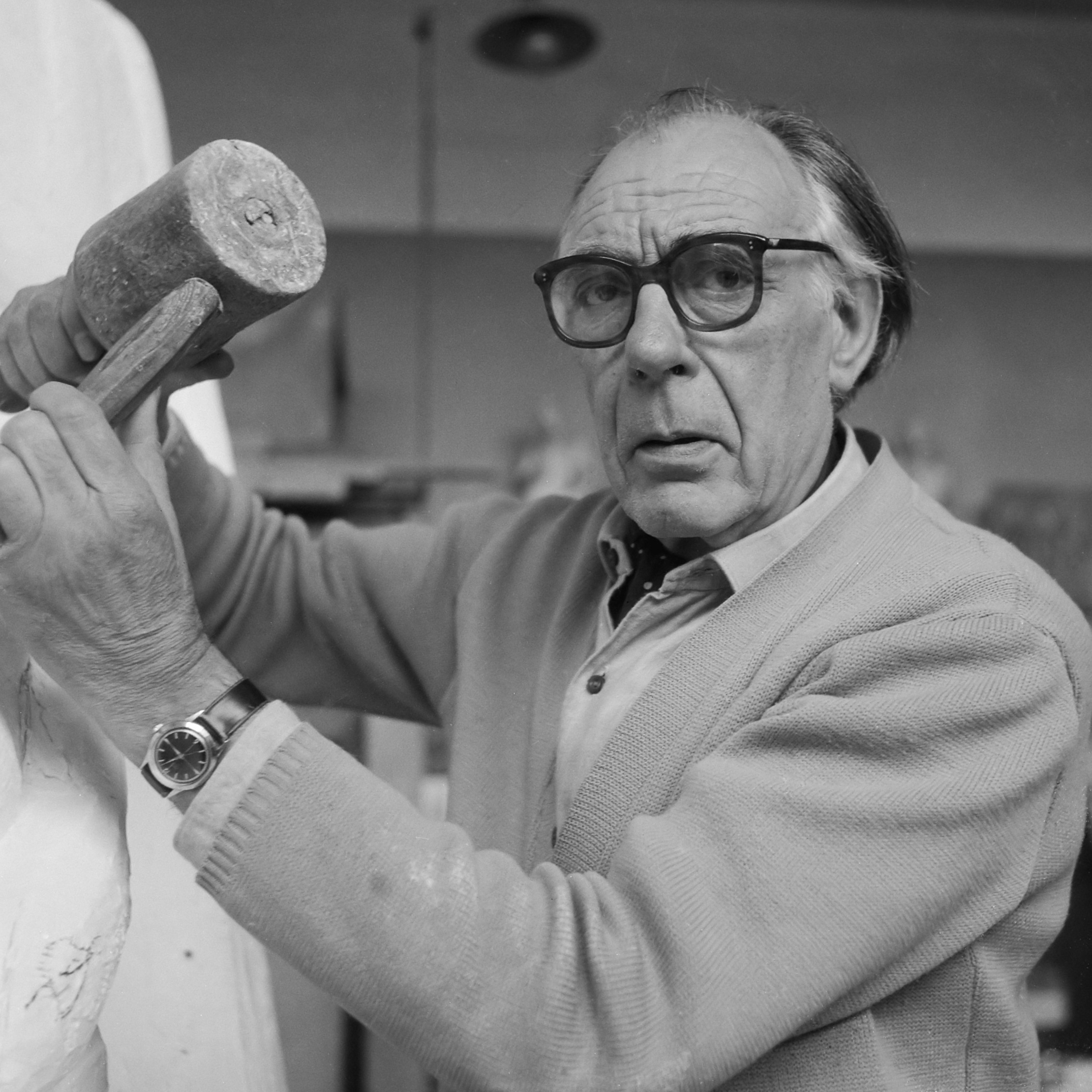 Beeldhouwer Johan Polet wordt 70 jaar 13 augustus 1964